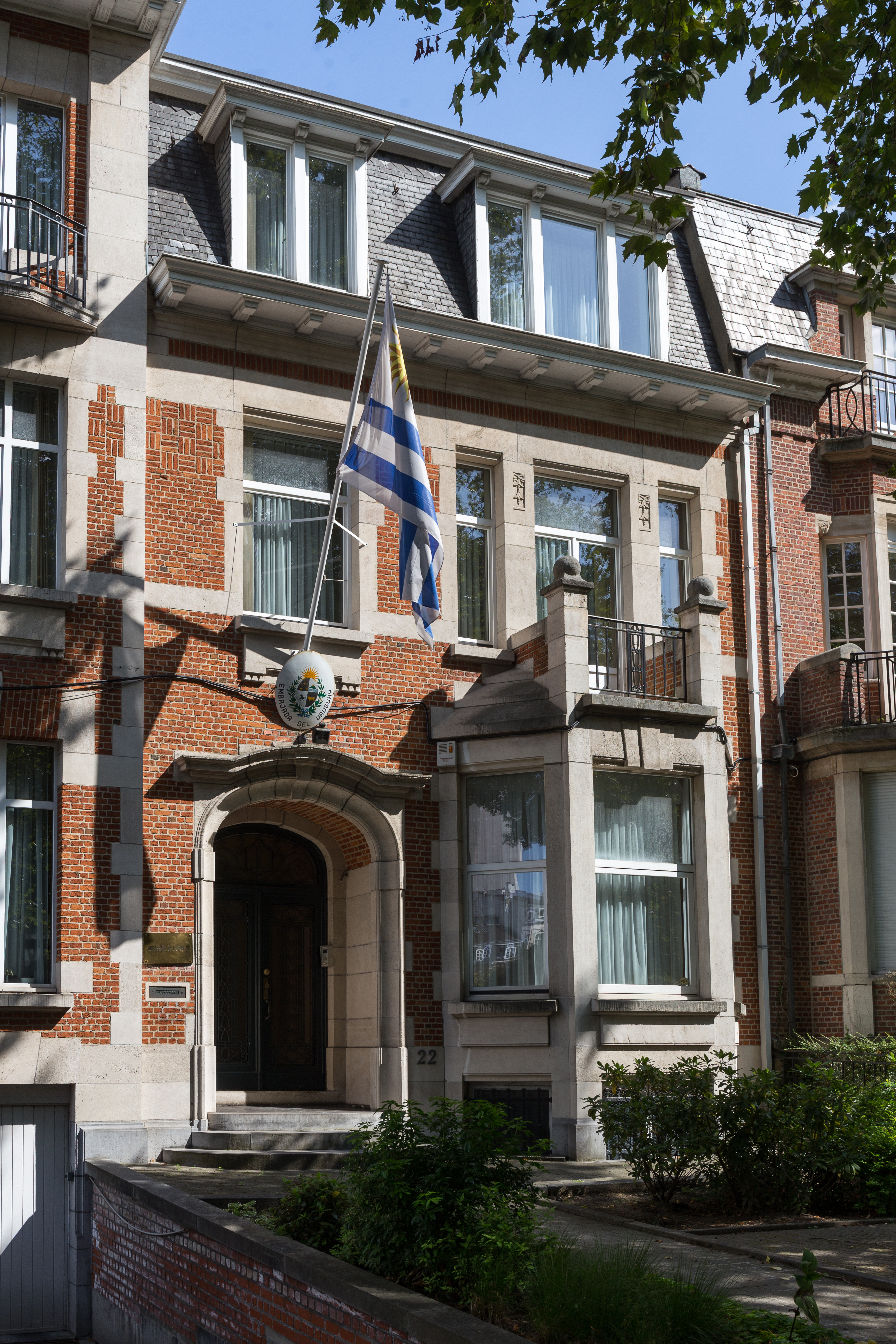 Ambassade d'Uruguay en Belgique, avenue Franklin Roosevelt 10 à Bruxelles.